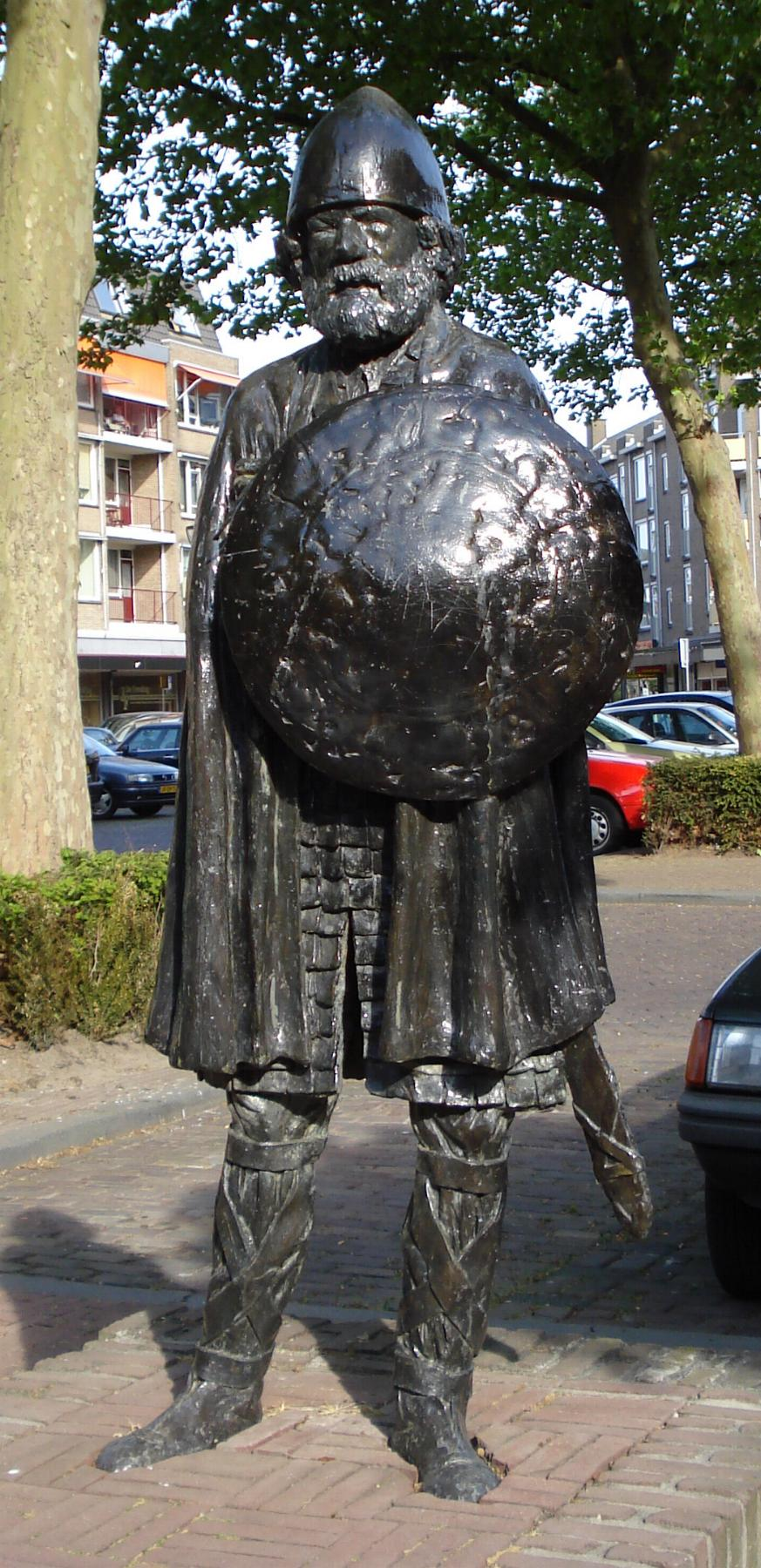 Dordrecht, Varkenmarkt. Kunstwerk "Dirk IV van Holland" van Jan Haas. Dordrecht/The Netherlands. FOP.